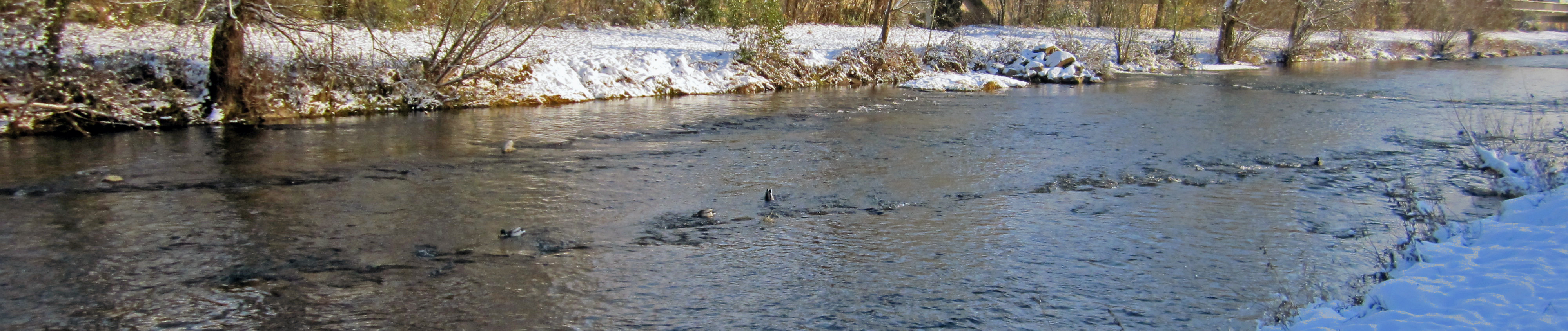 Trichterartig angeordnetes Lenkbuhnensystem im Fluss Wiese im Stadtgebiet von Lörrach. Die Lenkbuhnen dienen der Sohlenstrukturierung und dem Uferschutz.